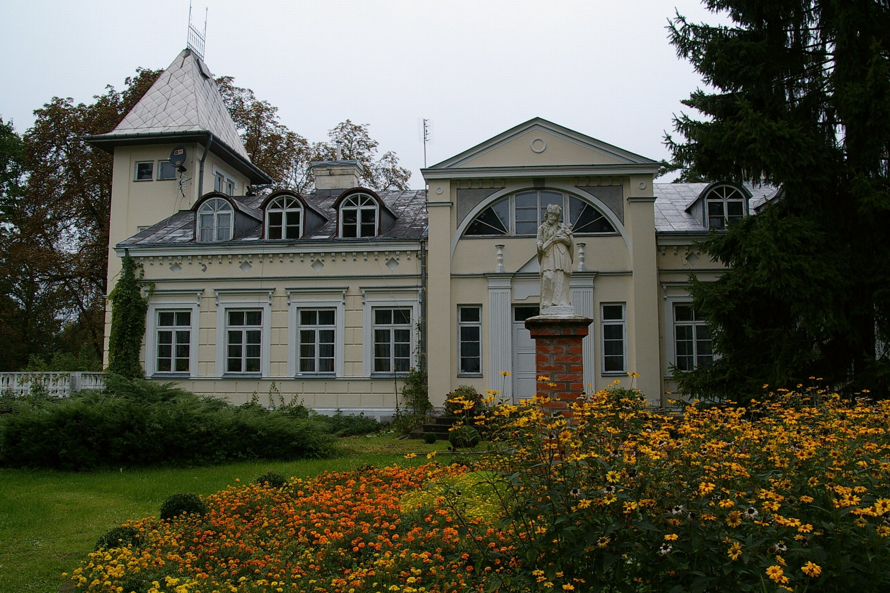 Kosewo, dwór, 2 poł. XIX